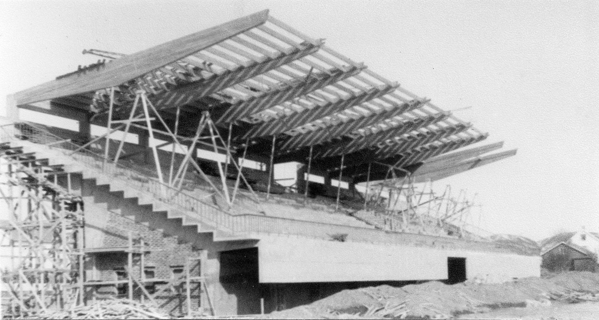 Aspmyra stadion, bygging av hovedtribunen fra 1966.